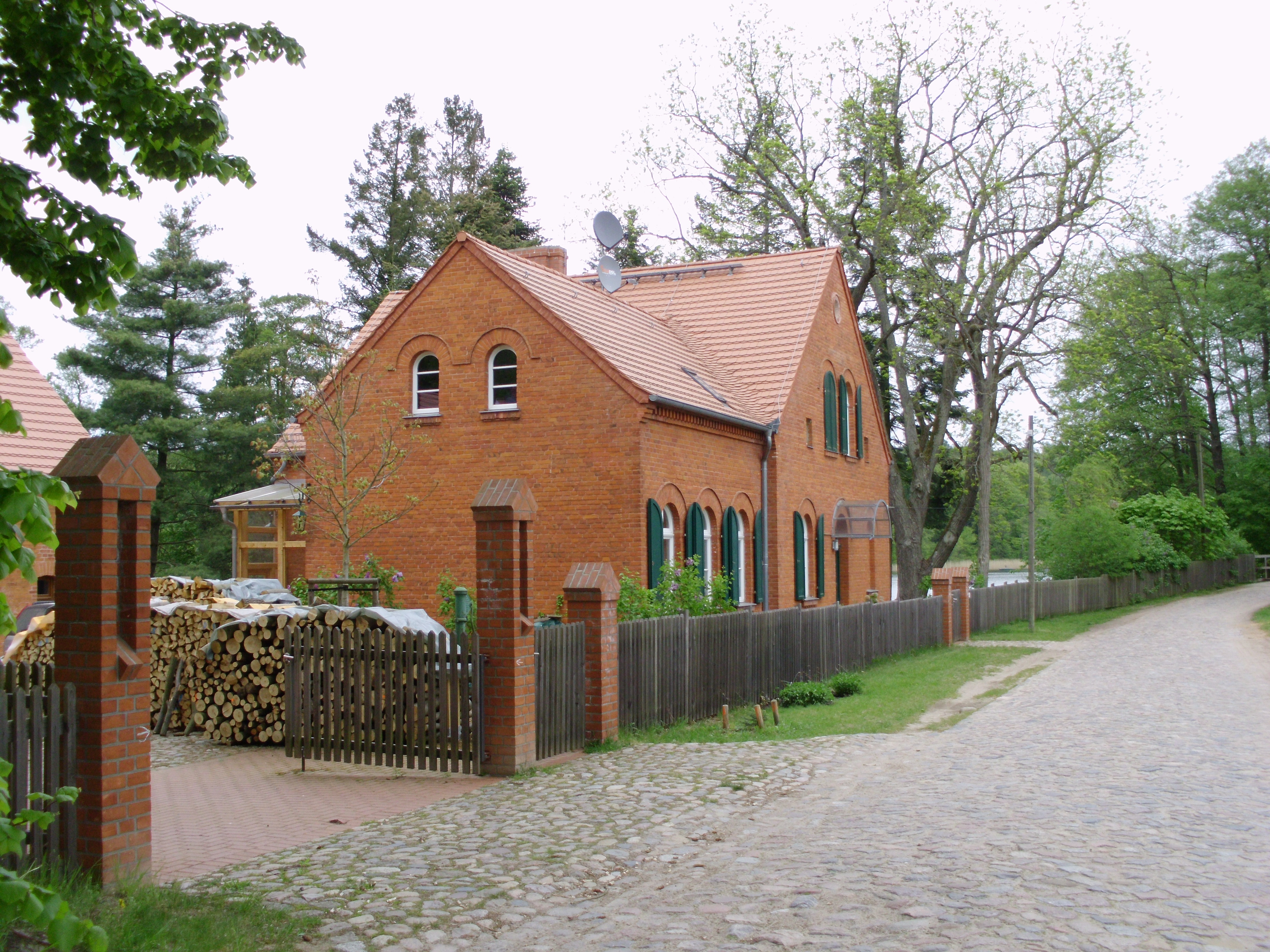 Försterei-Gehöft in Rottstiel, gehörig zu Krangen, gemeinsam Ortsteil von Neuruppin, Brandenburg, Deutschland